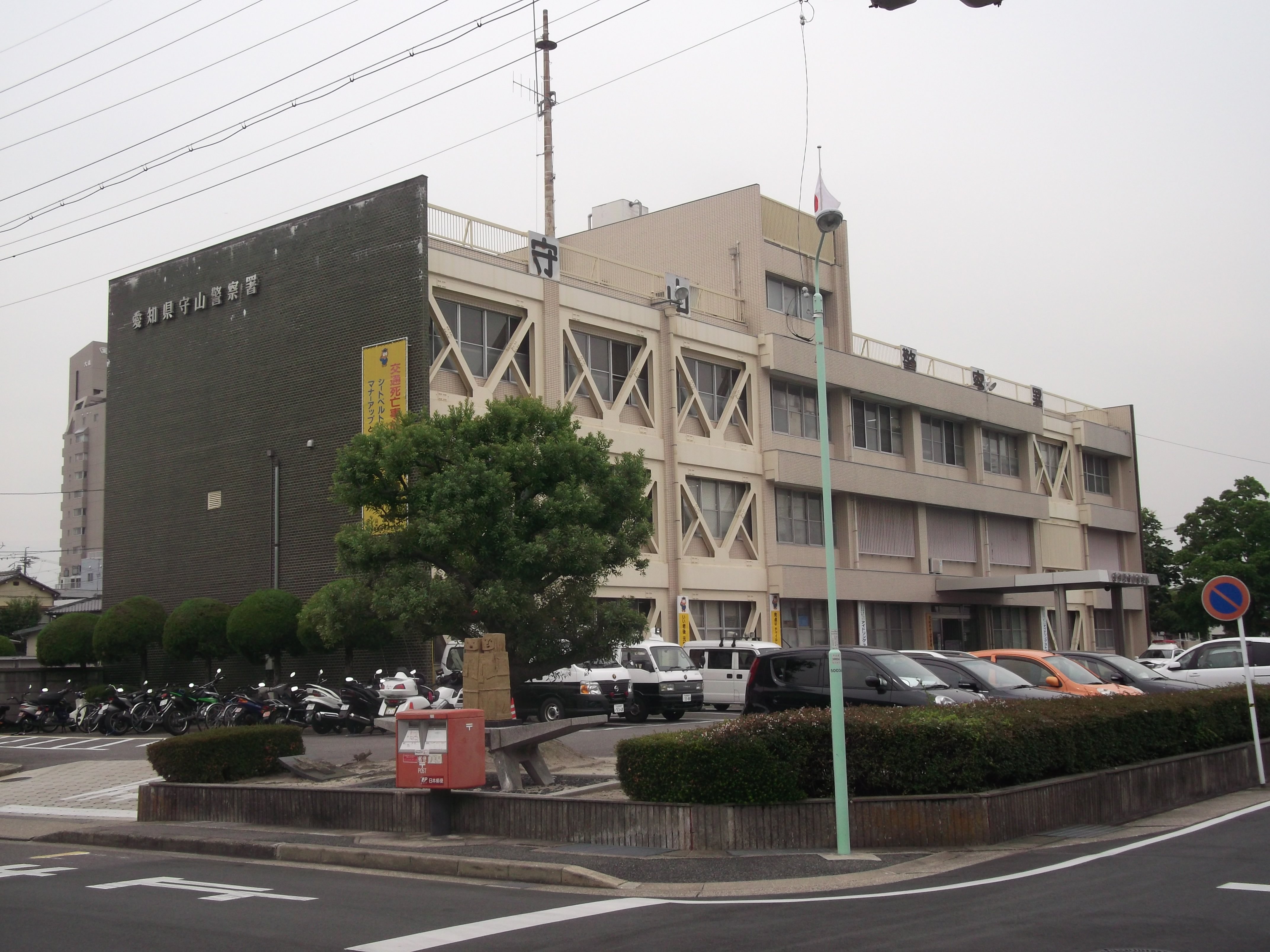 名古屋市守山区の愛知県警察守山警察署を南側公道西側より撮影